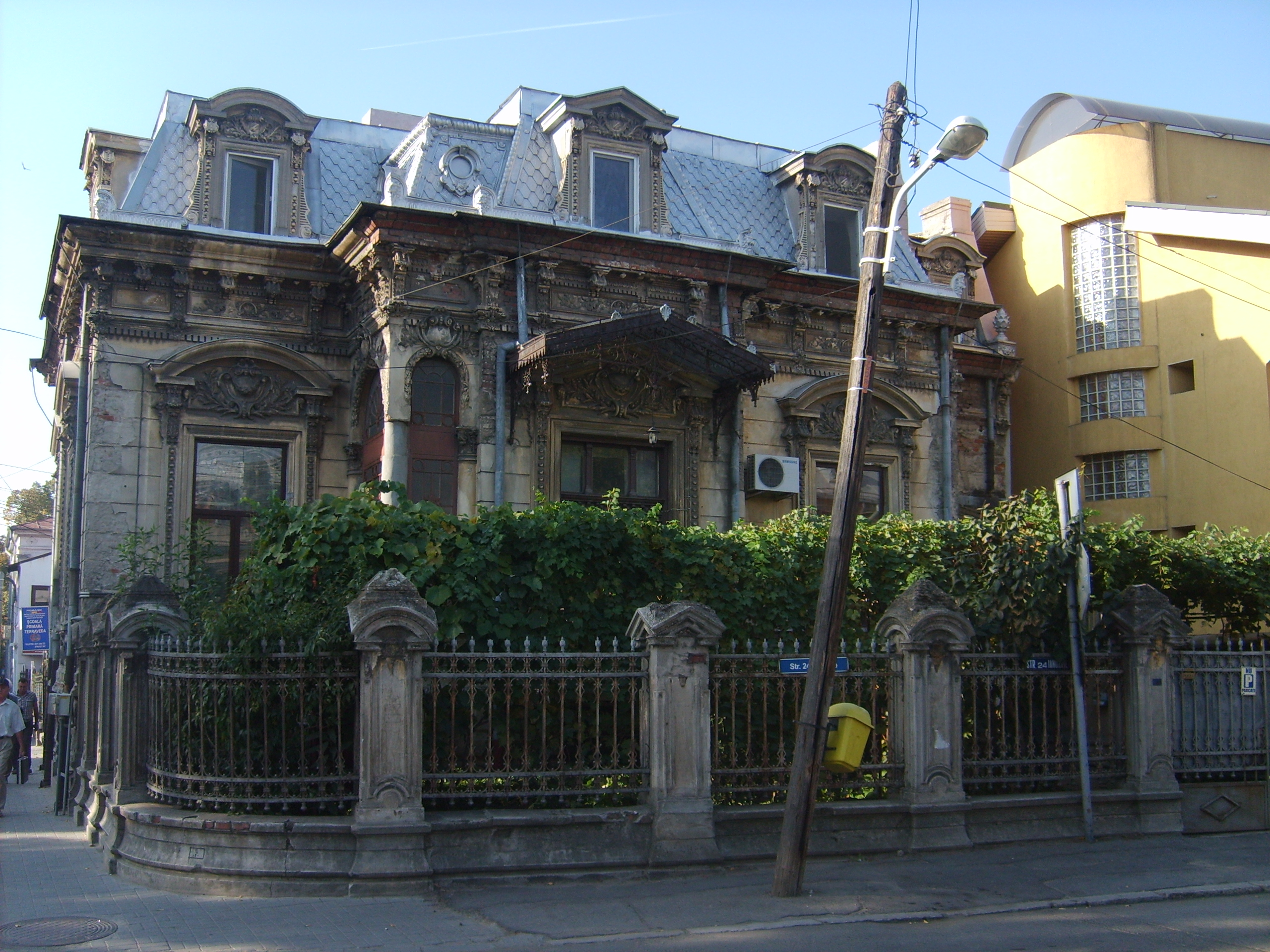 Casa Vorvoreanu (Palatul mitropolitan) 02